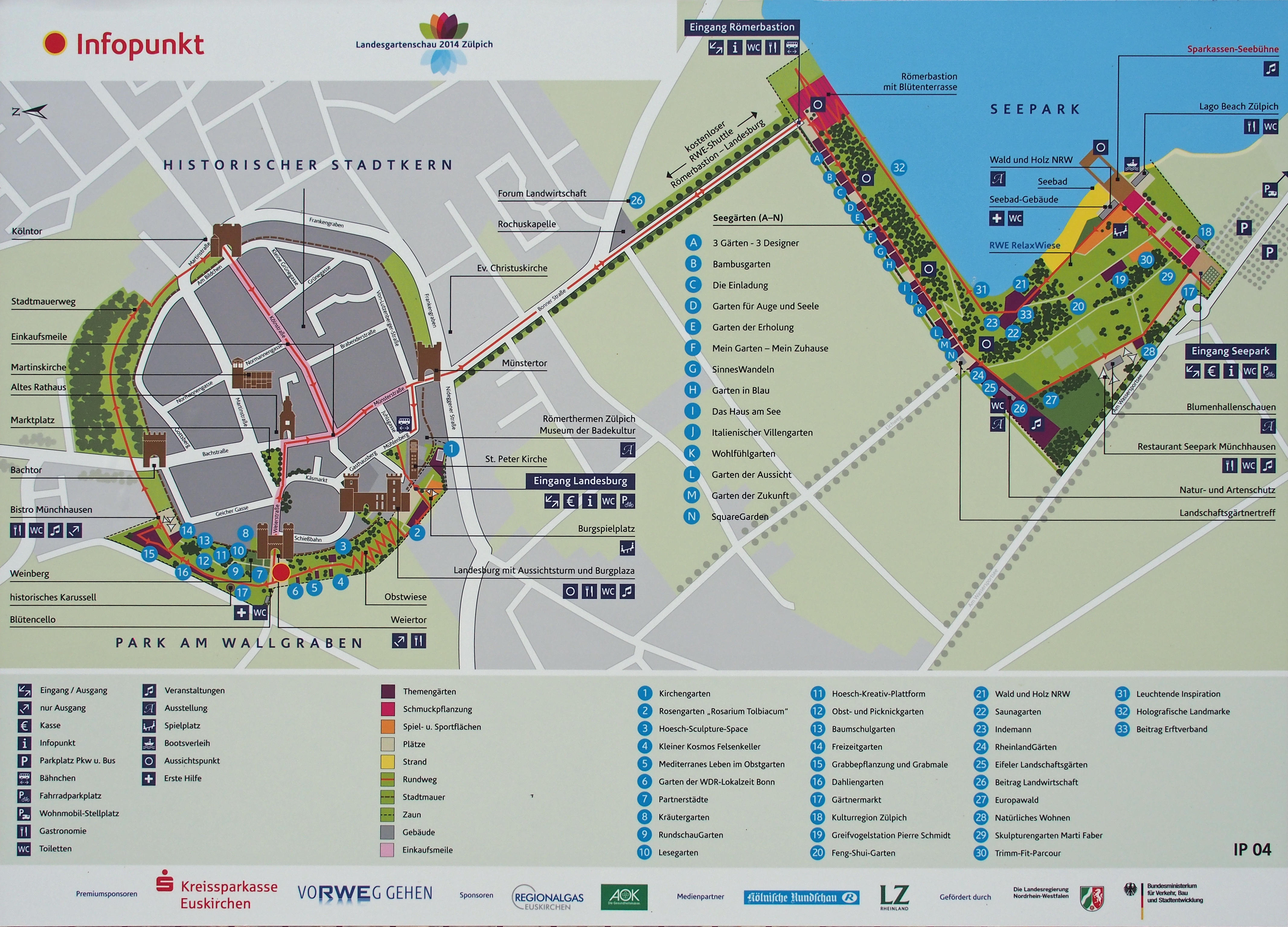 Übersichtsplan der Landesgartenschau Zülpich (Öffentliche Infotafel)